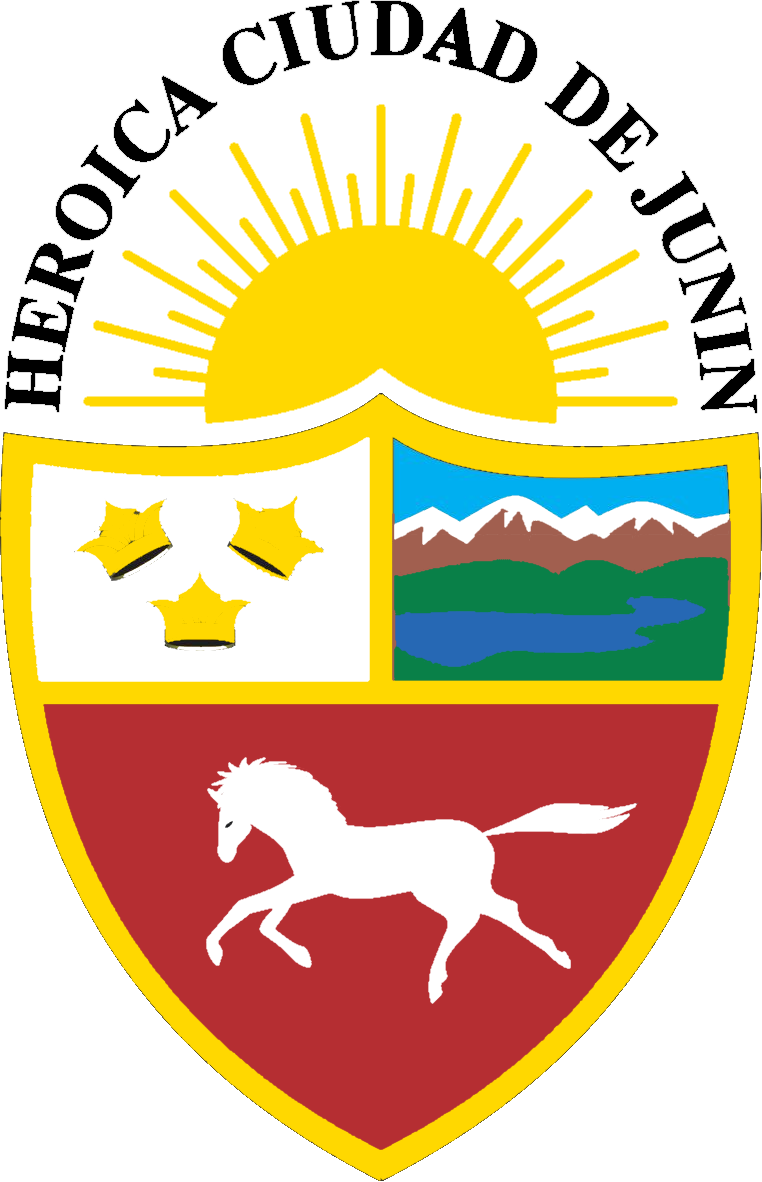 escudo provincial de junin